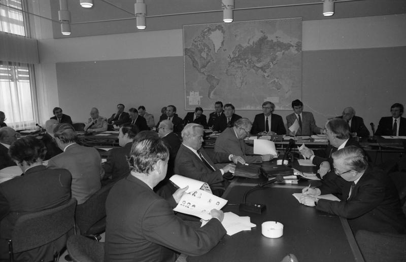 13.4.1988 Sitzung des Verteidigungsausschusses des Bundestages, Vorsitzender Alfred Biehle, zu der auch ehemalige Mitglieder des Verteidigungsausschusses geladen waren. Diese anläßlich des 75. Geburtstages des langjährigen Ausschußvorsitzenden Dr. Richard Jaeger heute zum ersten Mal durchgeführte Veranstaltungen soll zukünftig regelmäßig (alle 2 Jahre) erfolgen - im Neuen Abgeordnetenhaus des Bundestages.